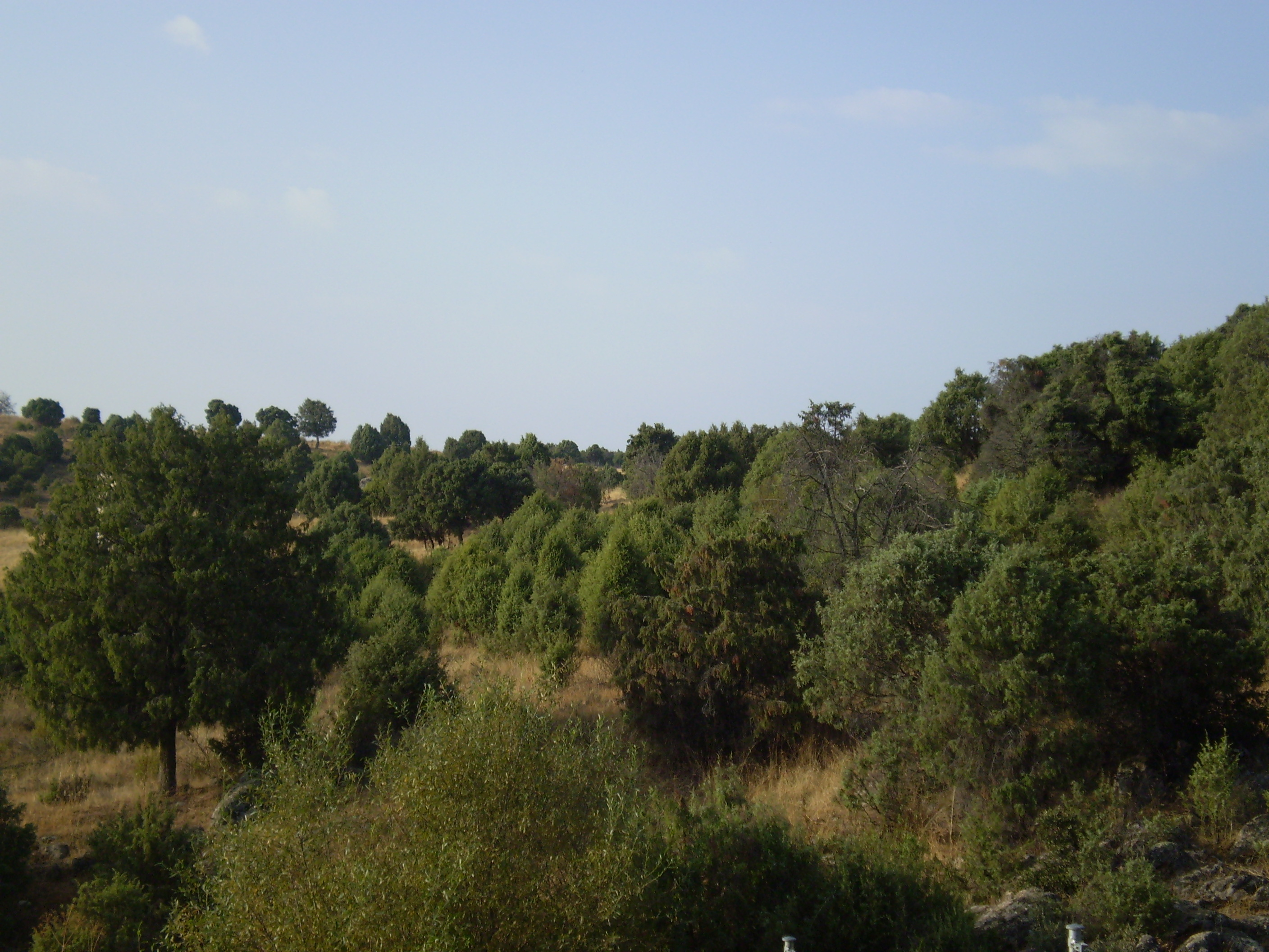 Enebral de Hoyo de Manzanares. Sierra del Hoyo (Sierra de Guadarrama, Community of Madrid, Spain)